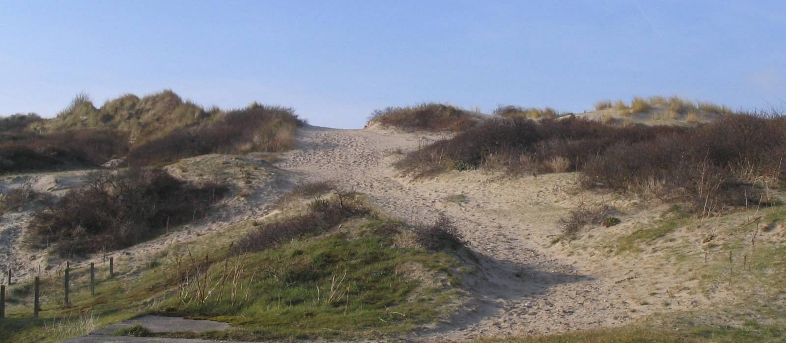 Aspect du massif dunaire de Fort-Mahon-Plage